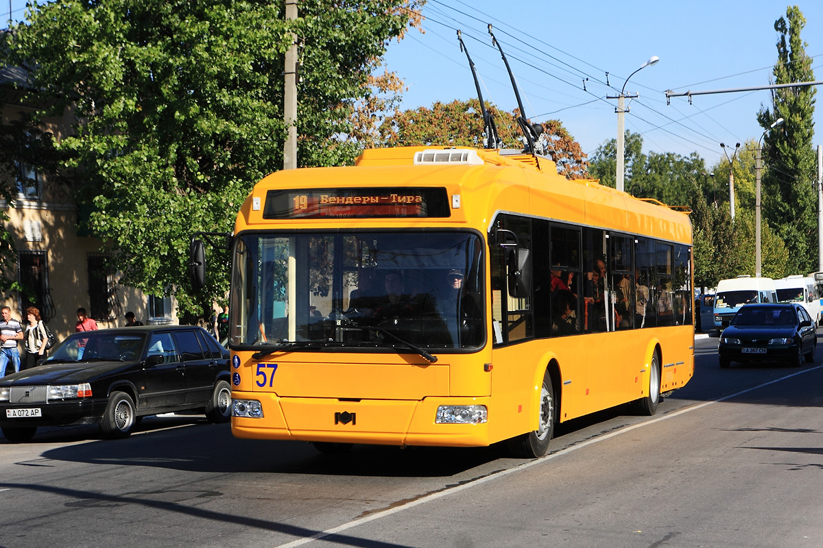 Троллейбус АКСМ-321 на маршруте №19. Бендеры, улица Суворова